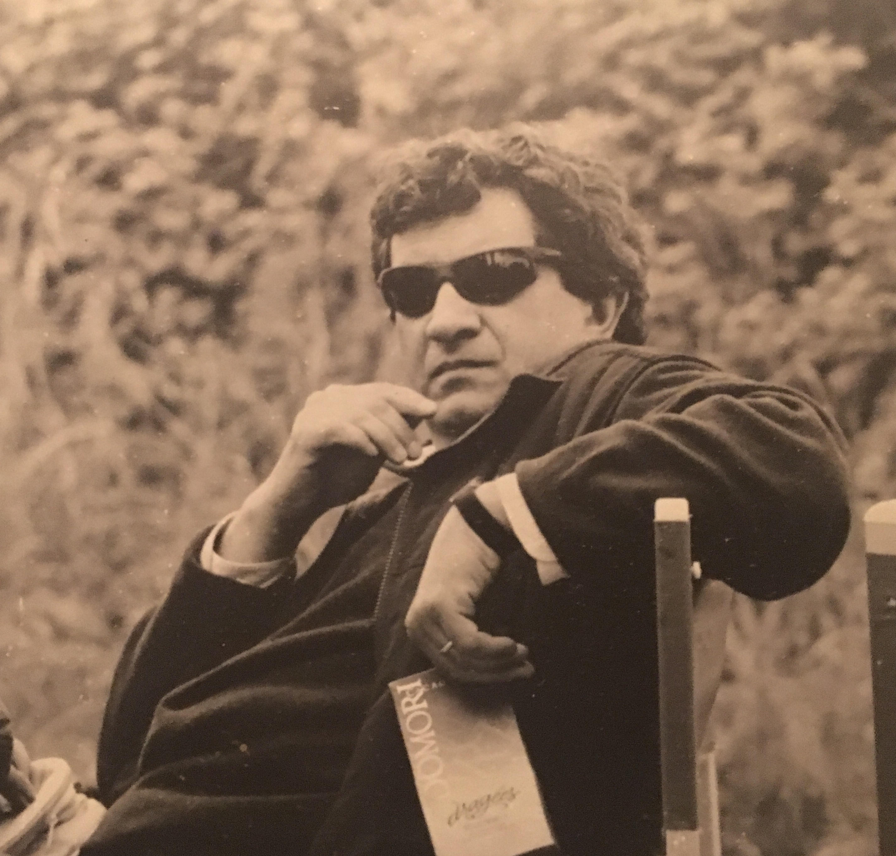 foto su un set cinematografico 2004